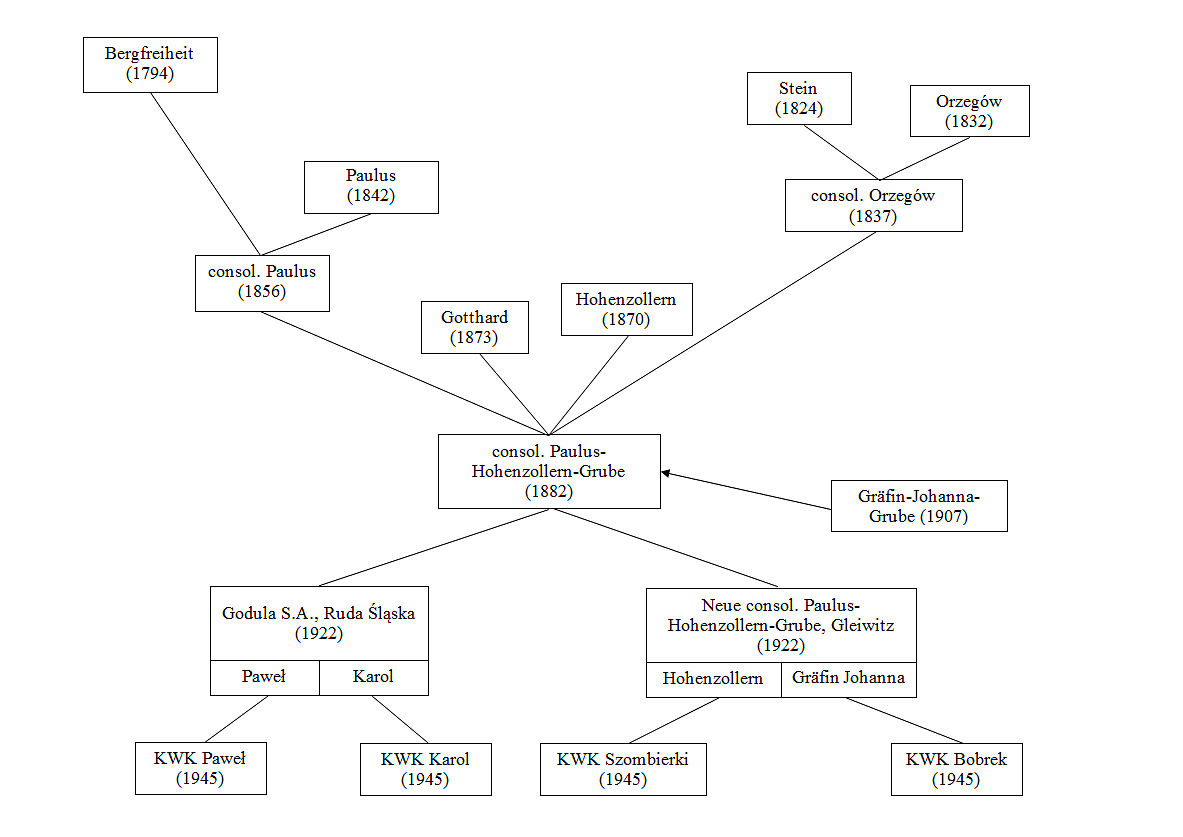 Bergwerksabstammung cons. Paulus-Hohenzollern